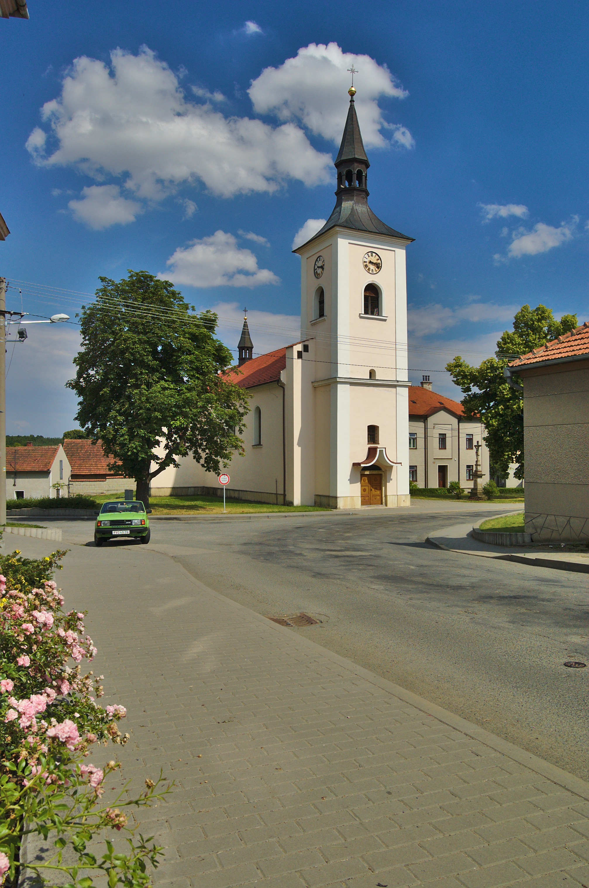 Kostel svatého Martina, Ptení, okres Prostějov